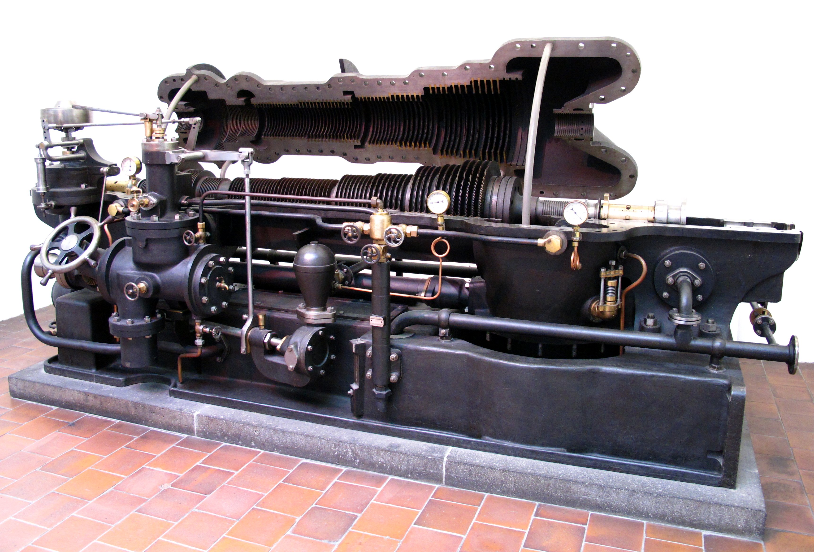 Überdruck-Dampfturbine, ähnlich der Parsons-Turbine, und diente zur Stromerzeugung in ersten kalorischen Klein-/Fabrikskraftwerken. Hersteller: Brown Boveri & Cie (BBC), 1902 Dampfeintrittsdruck: 9 bar Dampfeintrittstemperatur: 175 °C Drehzahl: 3000 RPM Leistung: 450 kW